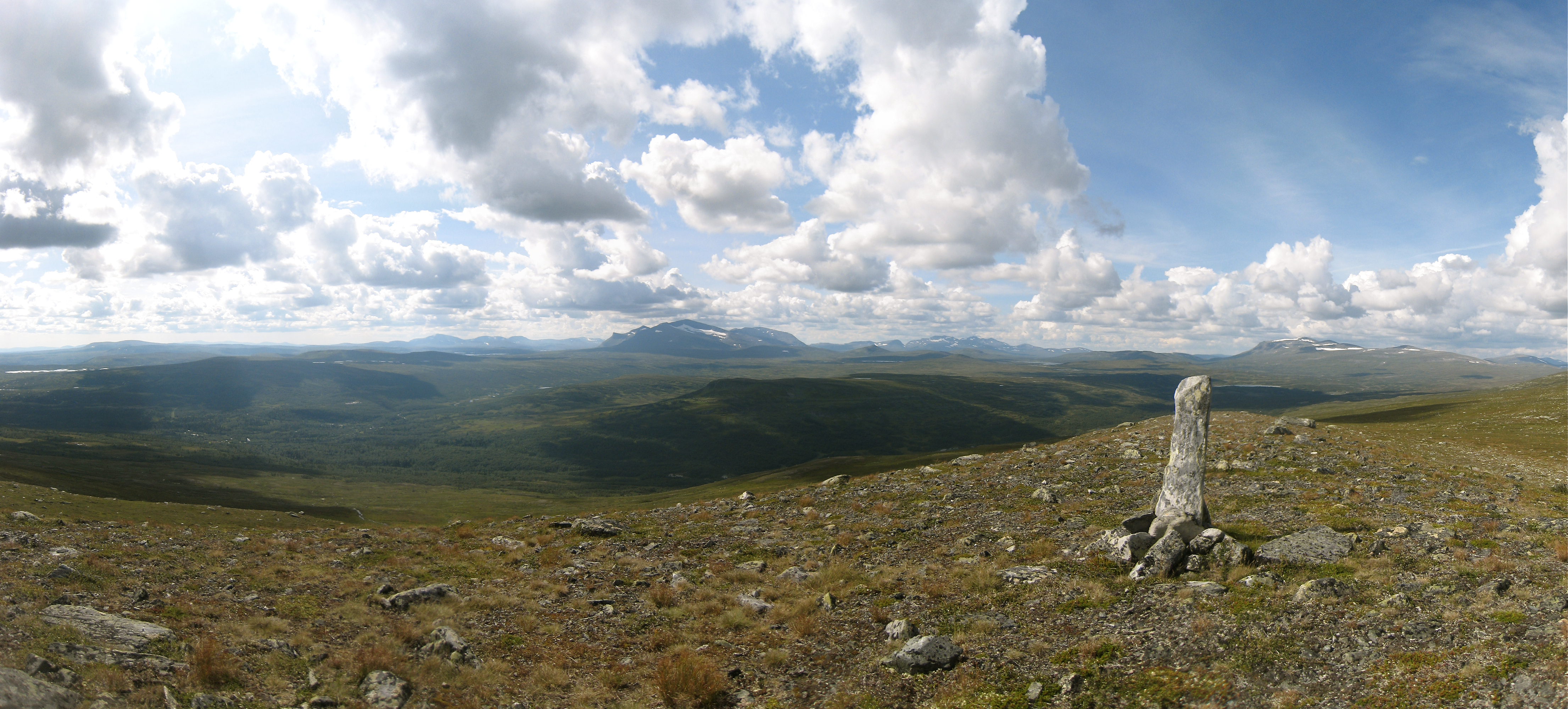 Panorama över Ljungdalen och nordvästra Härjedalen (och södra Jämtlands fjällvärld) taget från Dunsjöfjället.